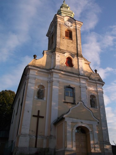 Kostol